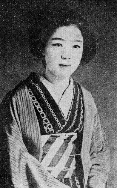 桜井八重子（本名・納八重子）。帝劇女優。家具屋の娘で、女子美術学校出身。文章をよくし、歌人でもあり、女流文芸誌『ビアトリス』の同人でもあった。『女の世界』（青柳有美創刊）の大正6年６月号の「女の世界寄稿家36才媛点取表」では、天分、文章、人気の各項目で100点とされ、女優の衣川孔雀に次いで２位を獲得、竹久夢二は恋文を送っている